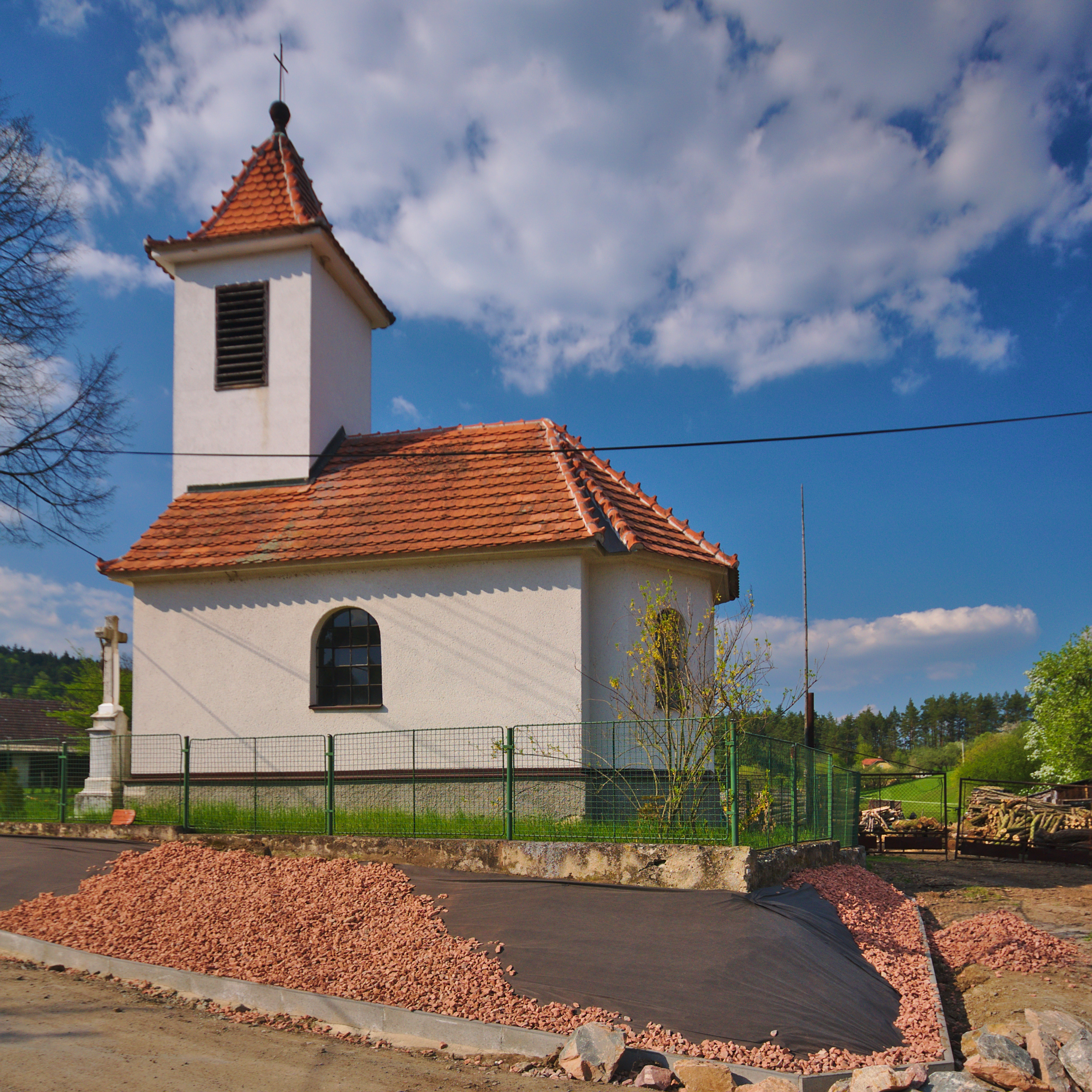 Kaple svatého Antonína Paduánského, Smrček, Býšovec, okres Žďár nad Sázavou